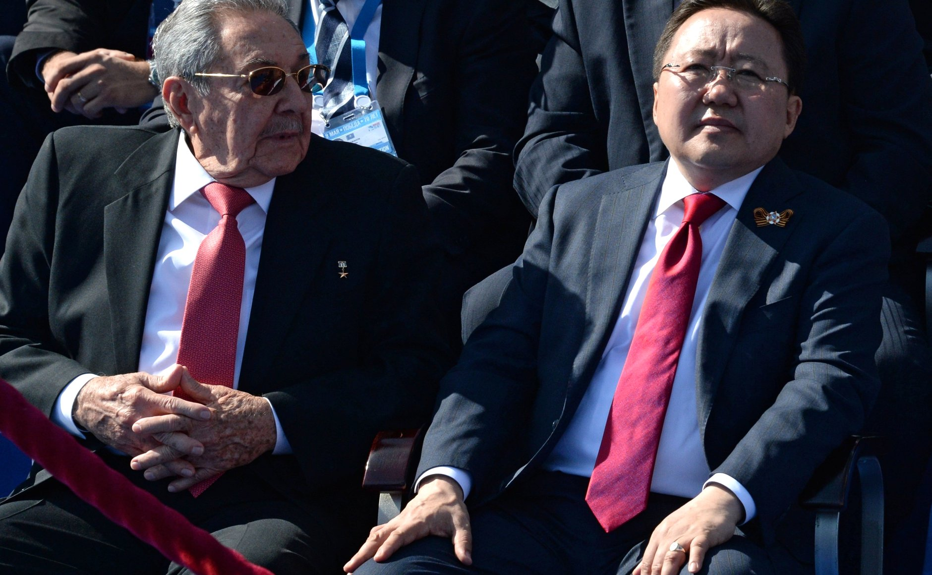 Председатель Государственного Совета Кубы Рауль Кастро (слева) и президент Монголии Цахиагийн Элбэгдорж во время военного парада в ознаменование 70-летия Победы в Великой Отечественной войне 1941–1945 годов.